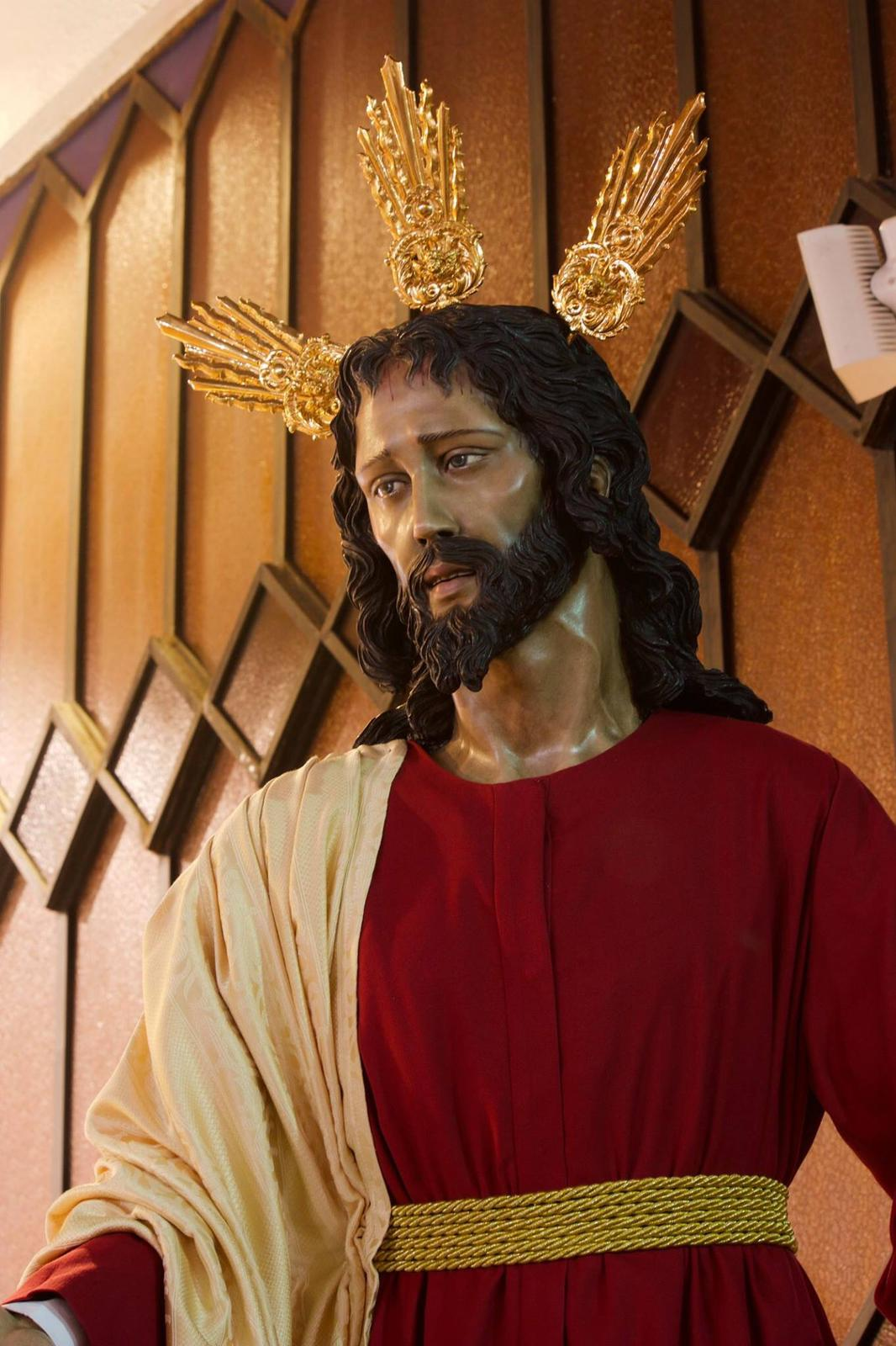 Talla de Nuestro Padre Jesús de la Redención en el Beso de Judas, titular de la Agrupación Parroquial de NPJ de la Redención en el Beso de Judas, María Santísima de la Paz y Madre de Dios del Rocío, con sede canónica el parroquia de Ntra. Sra. del Carmen del barrio de Carrús de Elche.